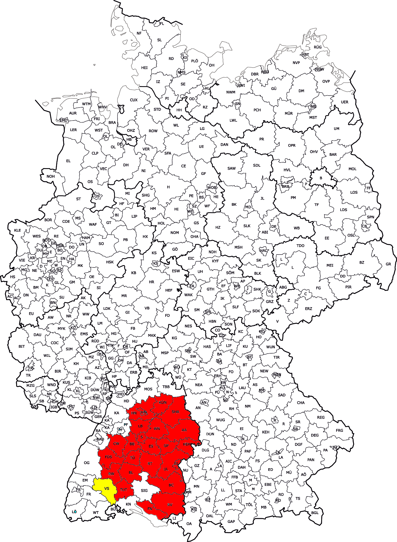 Suvremeni Württemberg unutar granica Njemačke